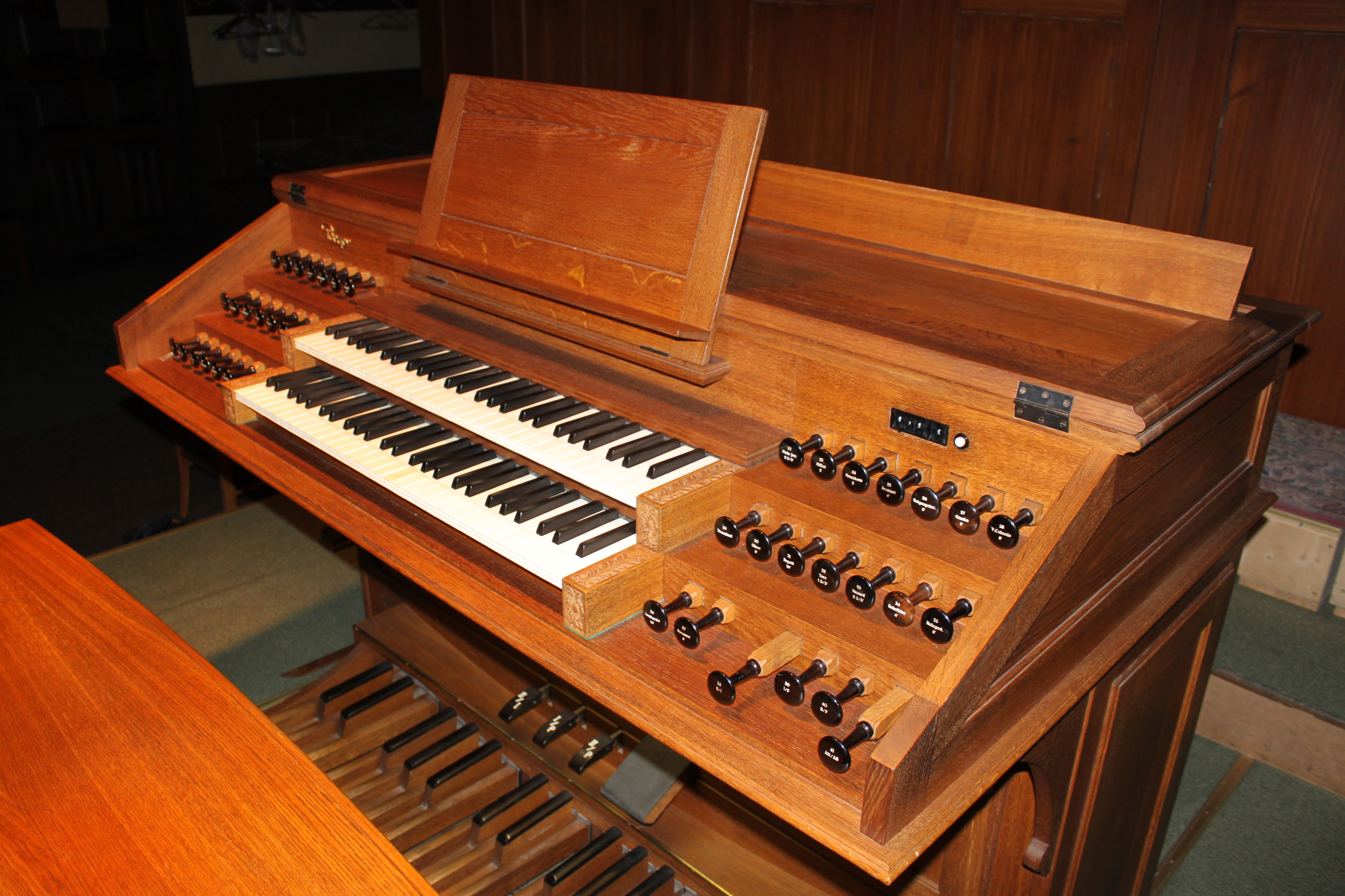 Spieltisch der Orgel der Pfarrkirche Neuottakring, Wien XVI.